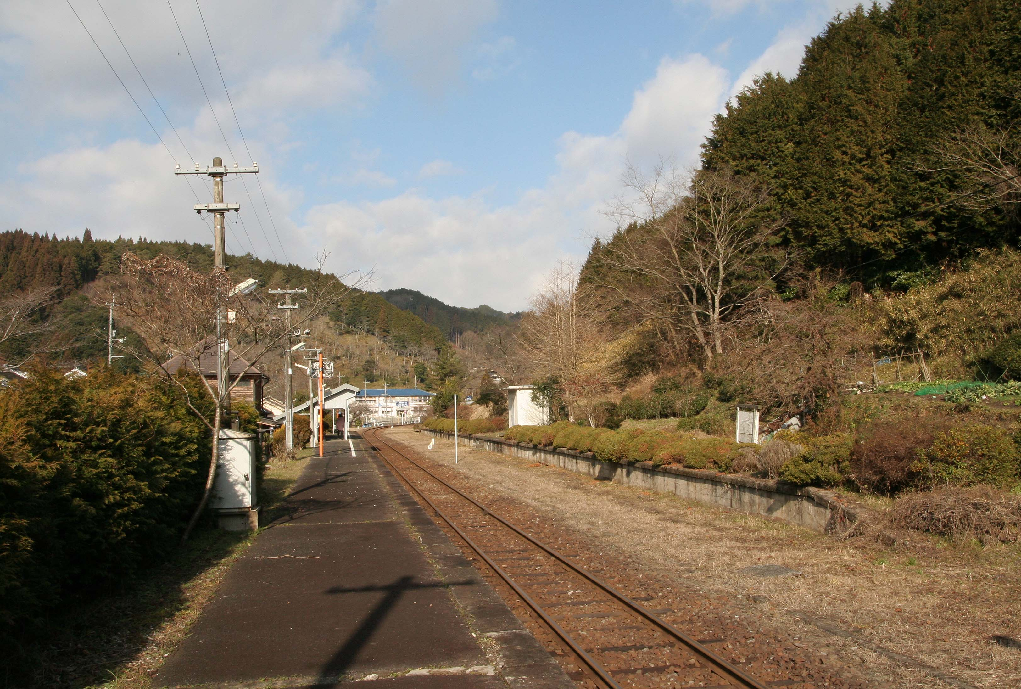 富原駅の構内